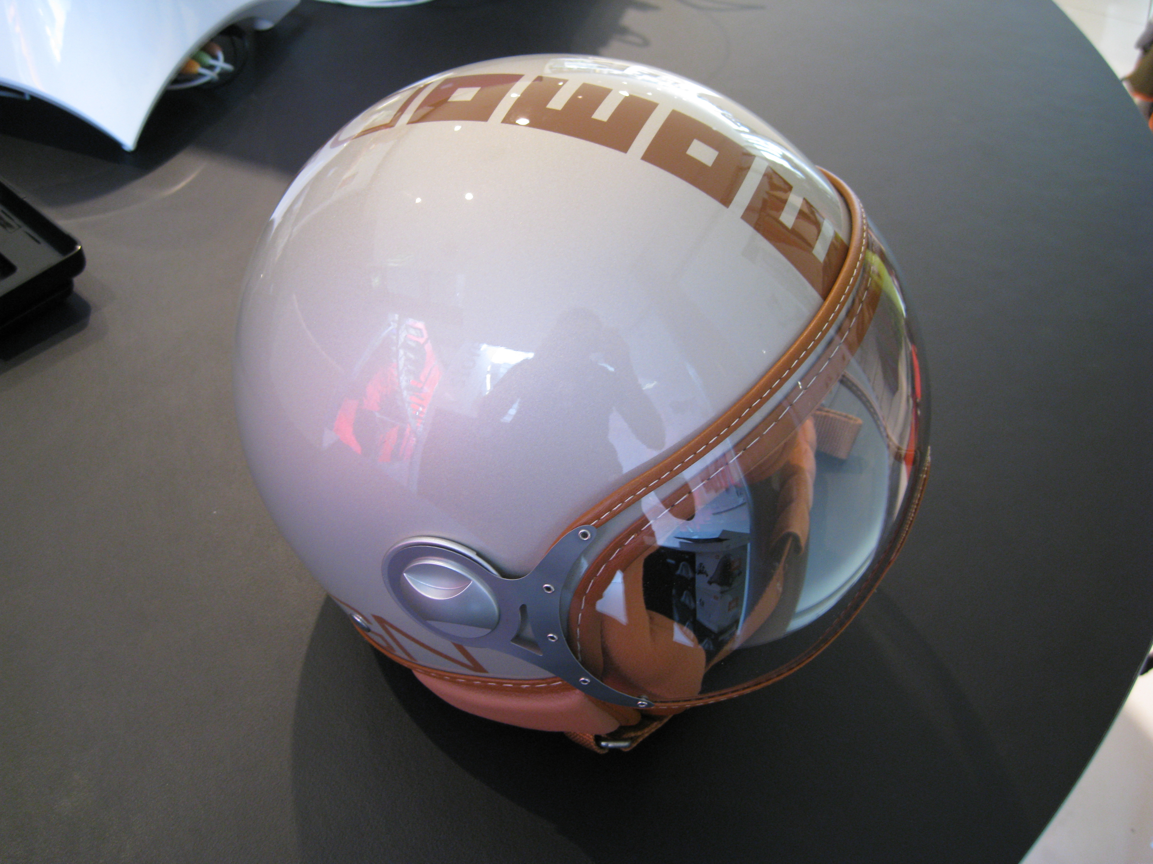 Momo_helmet